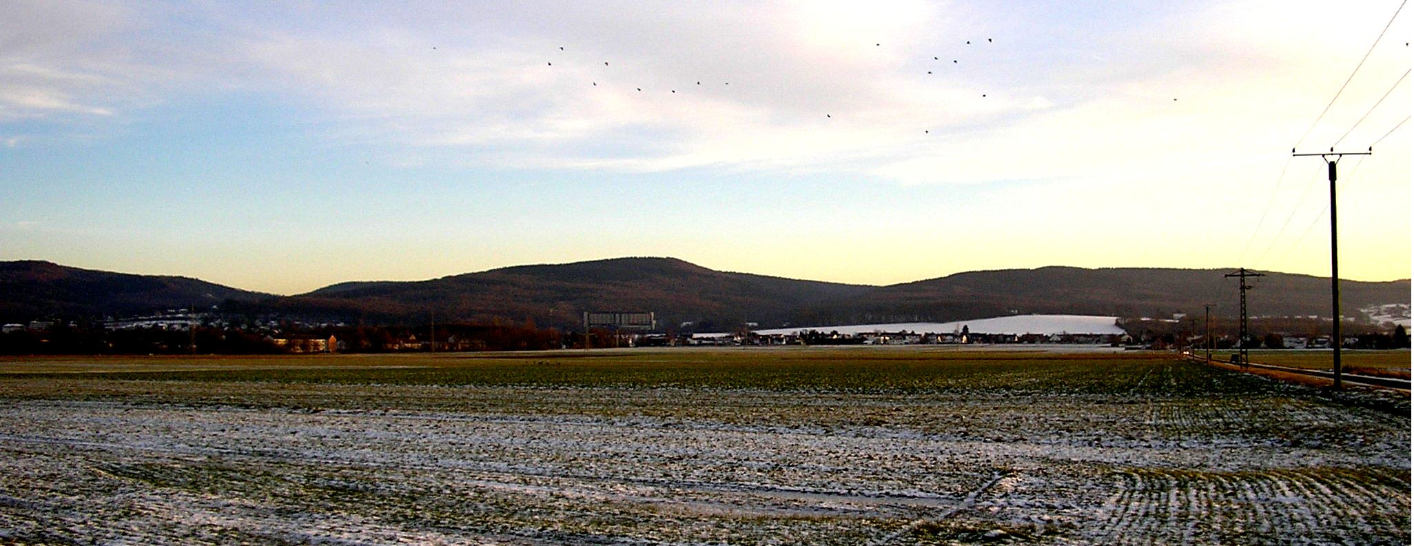 Wiehengebirge im Winter